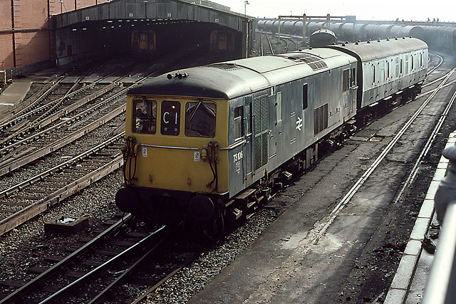 Dover Western Docks Sidings